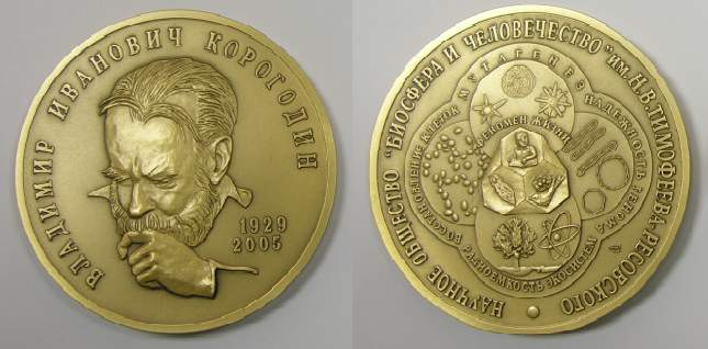 Бронзовая медаль «Феномен жизни» им. В.И. Корогодина для молодых ученых, сделавших вклад в области генетики, радиобиологии, радиоэкологии, и теоретической биологии».